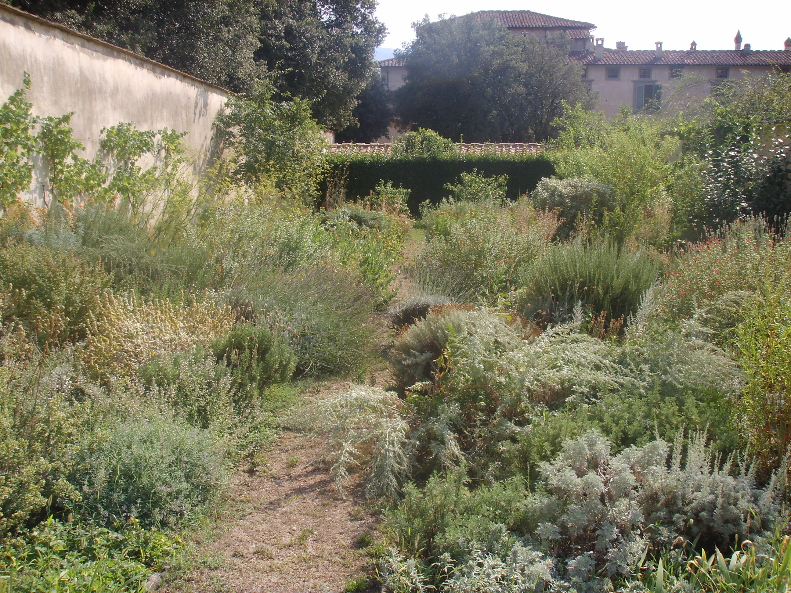 Parco di Villa Reale di Castello (Villa di Castello) Secret garden (Orto segreto di piante aromatiche) in Florence Italy